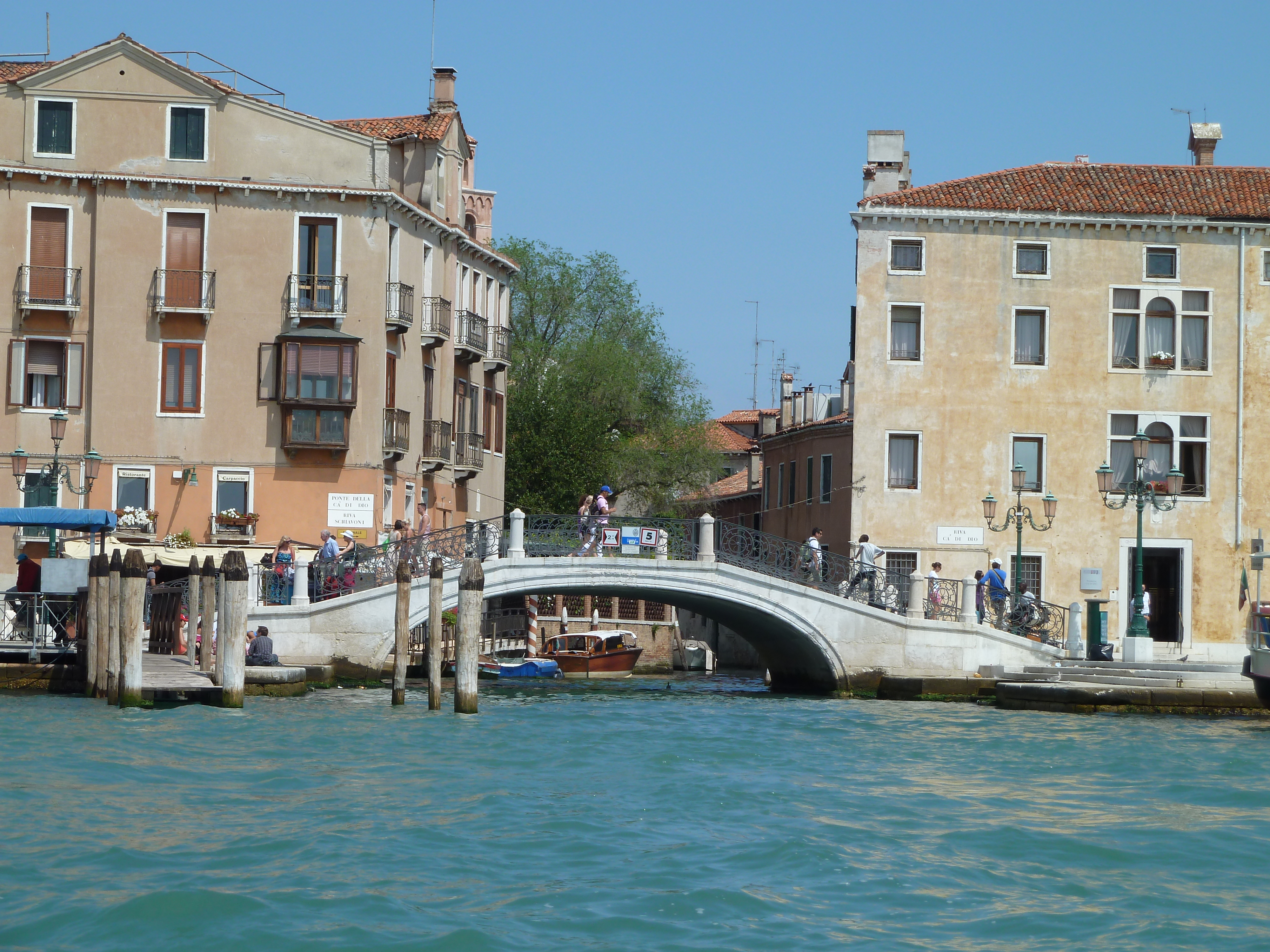 Ponte della ca di dio